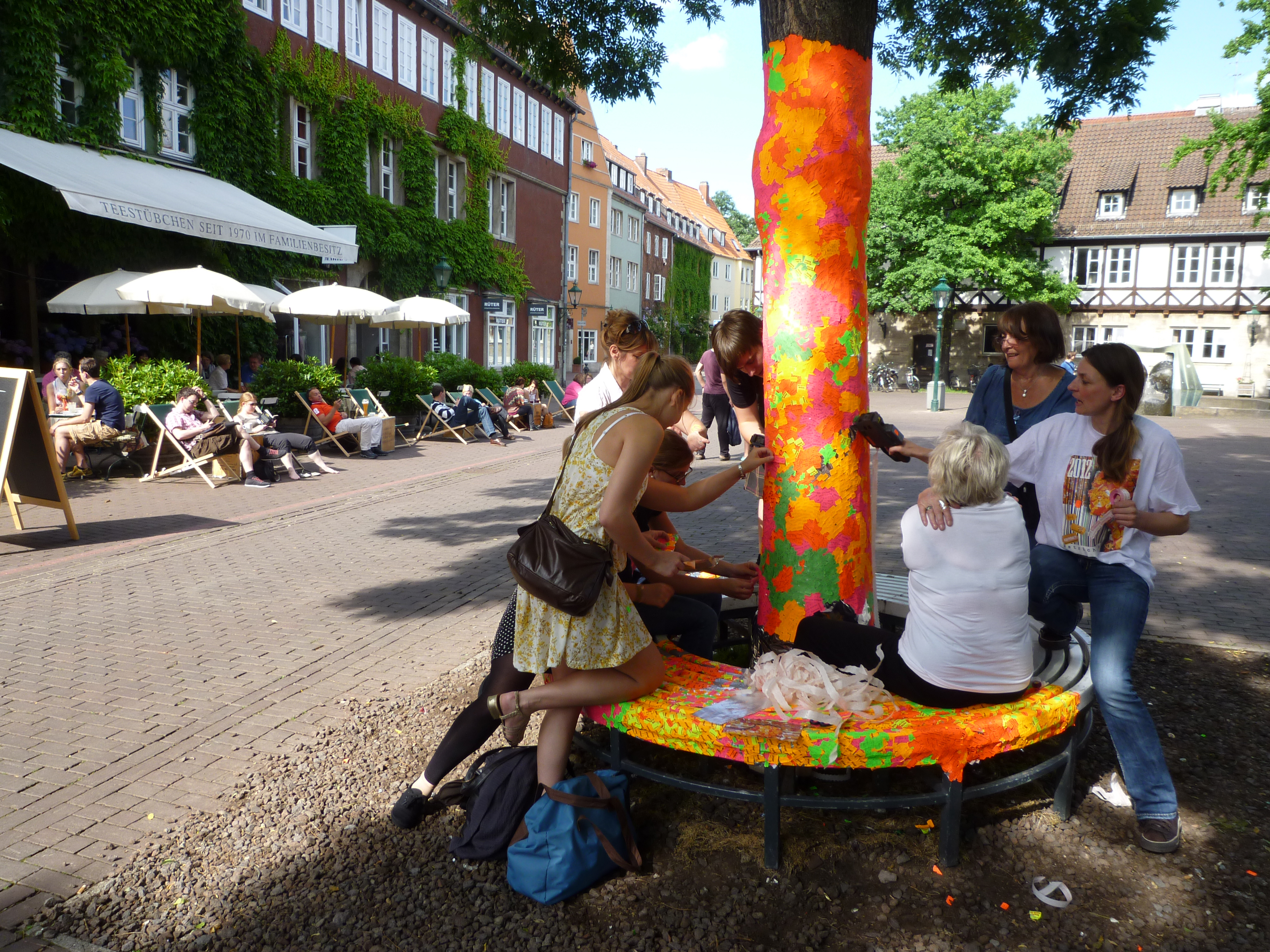 Spontan und freiwillig: Am Ballhofplatz in Hannover bekleben AktionskünstlerInnen einen Baum und eine Sitzbank im Rahmen von Strich-Code, eine "Schwarmkunstaktion" zur Hinterfragung von käuflicher Sexualität und käuflicher Kunst ...